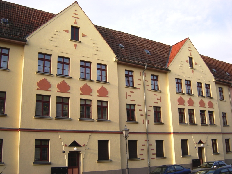 Woerlitzer Strasse, Magdeburg (Germany)